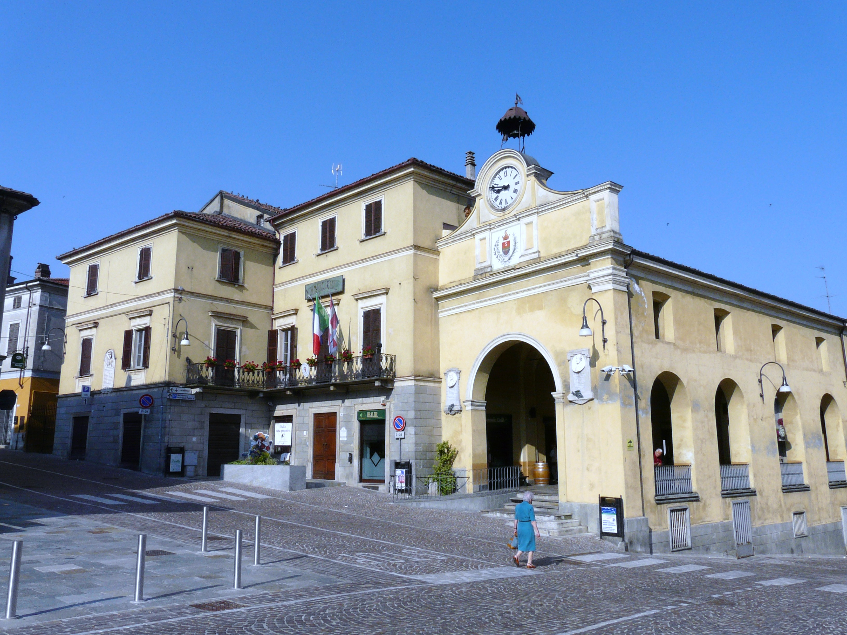 Palazzo del municipio, San Salvatore Monferrato, Piemonte, Italia